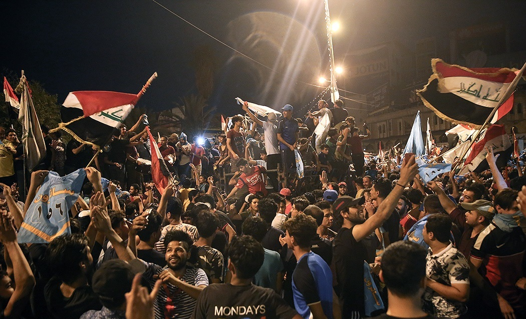 با پایان یافتن چهارمین دوره انتخابات پارلمانی جمهوری عراق، کار شمارش آرا آغاز و مردم هوادار ائتلافها و جریانات مختلف سیاسی عراق نتیجه این رویداد را دنبال میکنند. بامداد دوشنبه ۲۴ اردیبهشت ۱۳۹۷ به وقت تهران، برخی هواداران احزاب و جریانات سیاسی خصوصا حامیان ائتلاف سائرون نیز با حضور در خیابانهای بغداد پایتخت عراق به شادی و پایکوبی پرداختند.